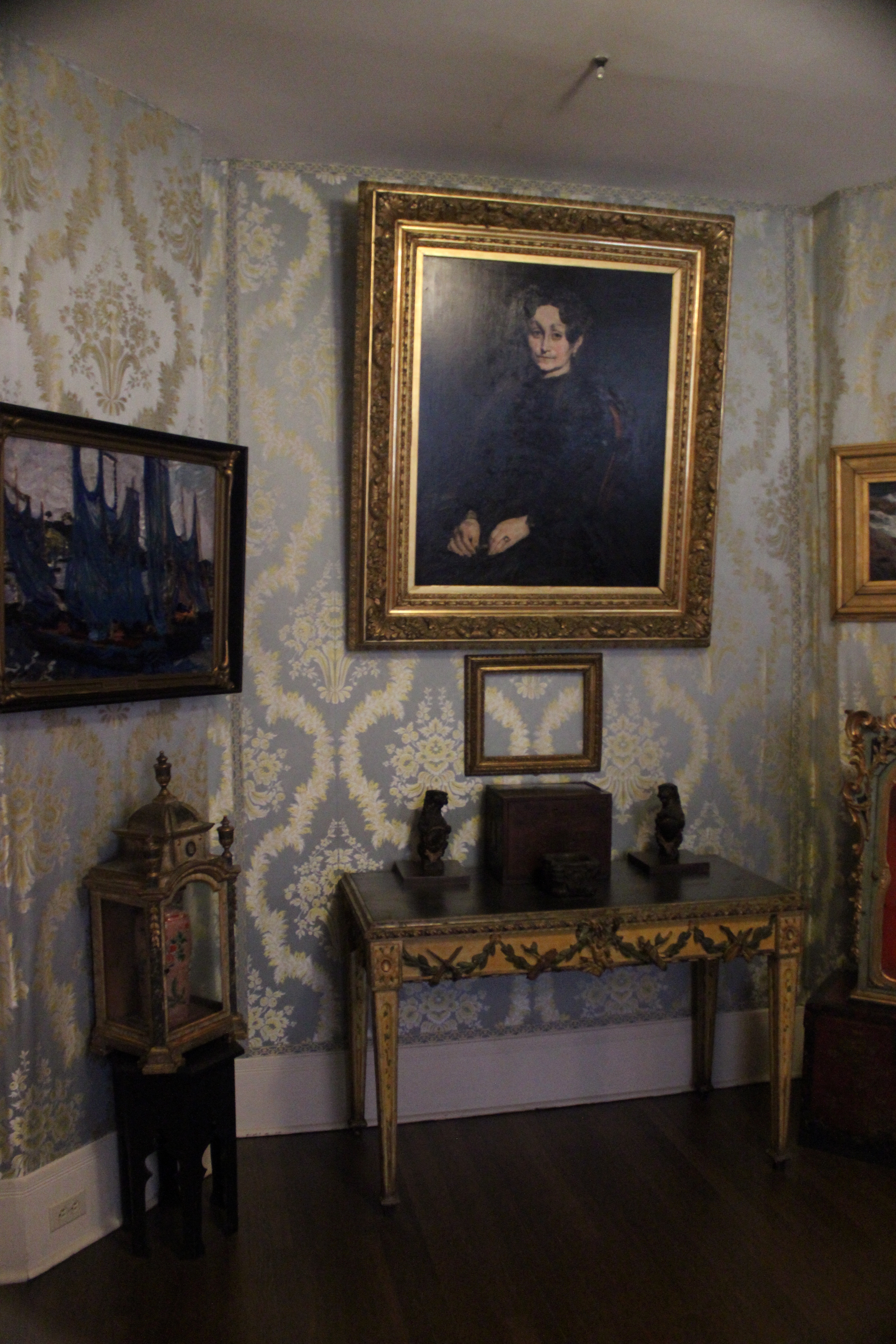 Boston, Fenway Court (Isabella Stewart Gardner Museum). Interior.